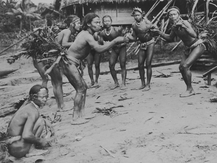 Orang-orang Mentawai di pantai Pulau Siberut tengah memerankan diri sebagai ayam dalam sebuah tarian